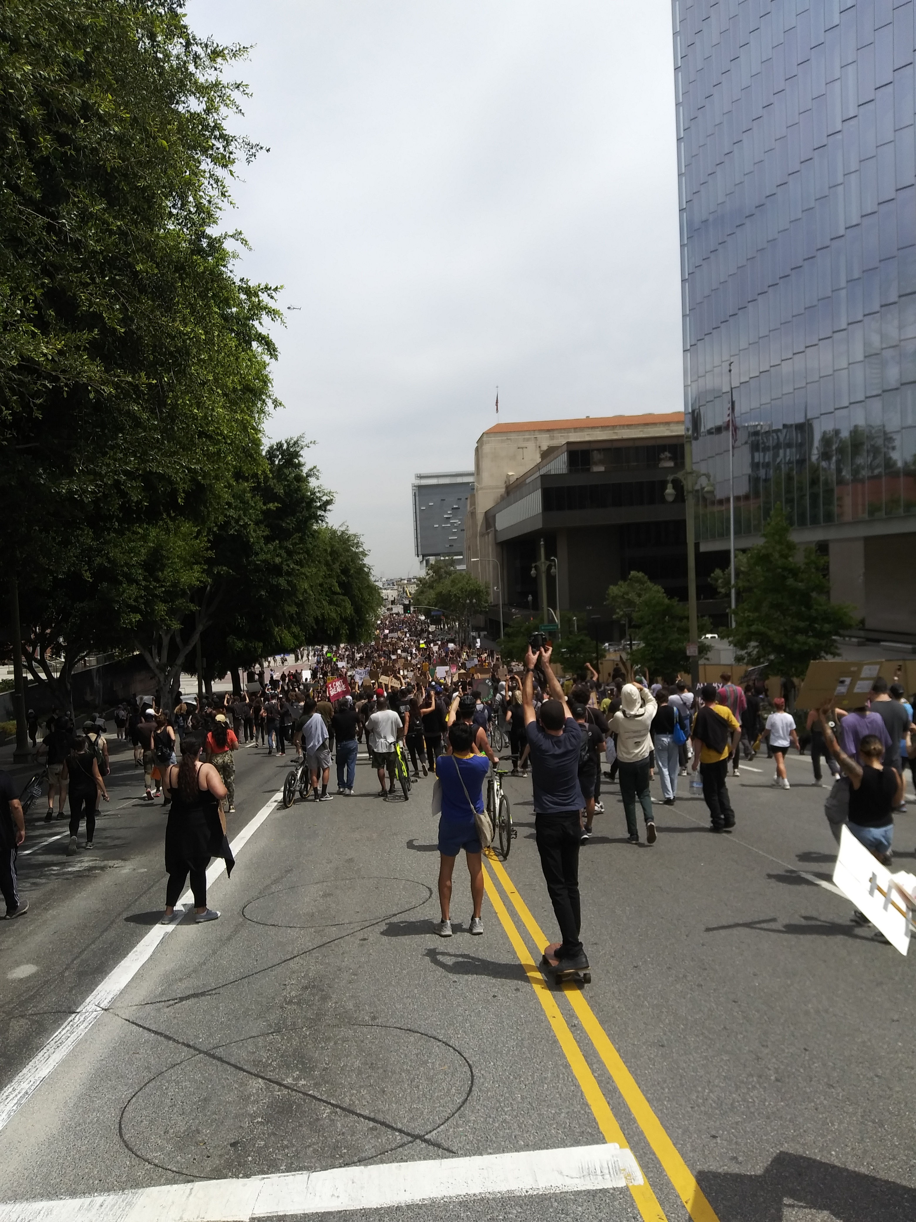 George Floyd Demonstration am 2. Juni 2020 in Downtown Los Angeles.